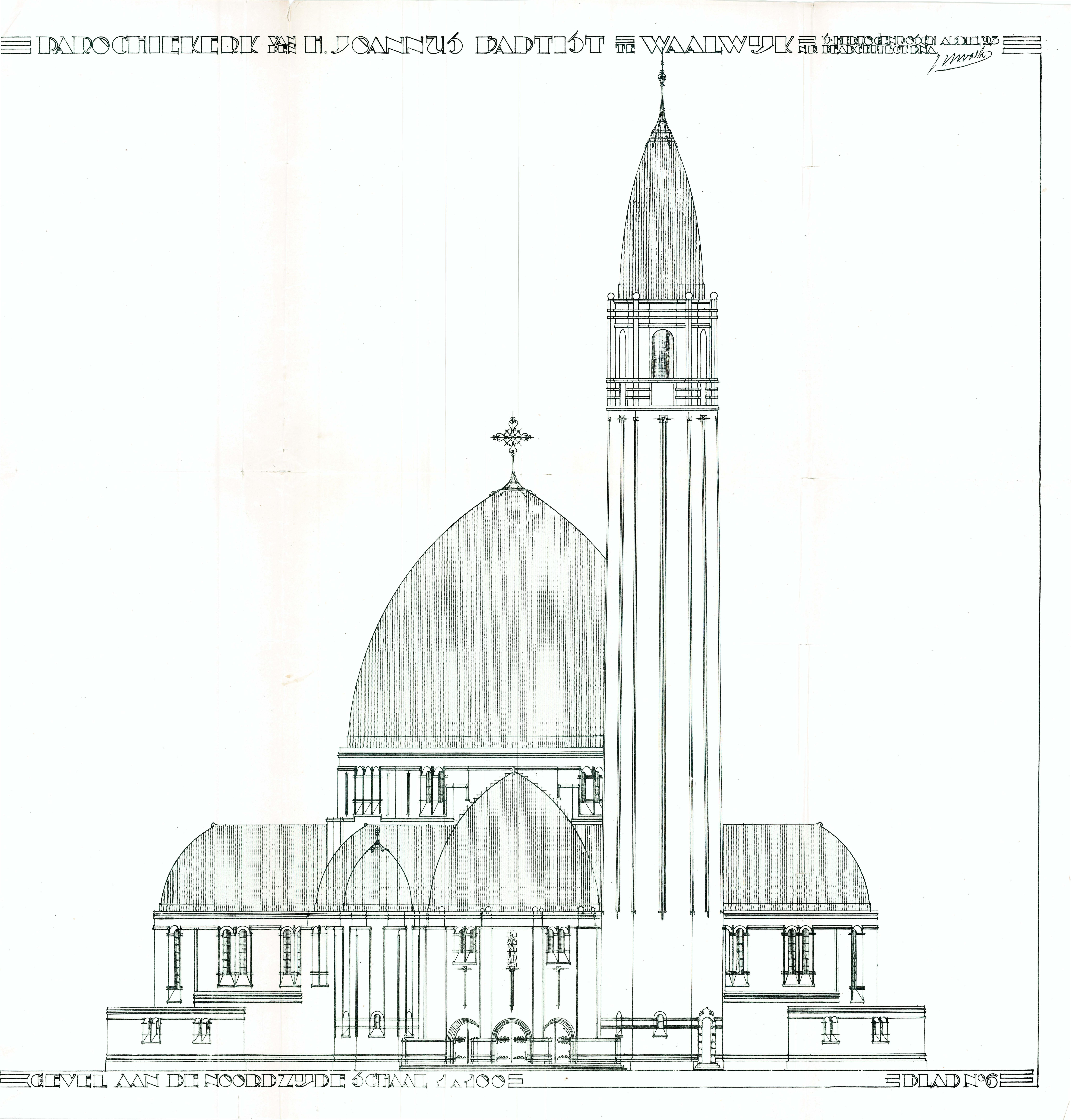 Ontwerp voorgevel Sint-Janskerk in Waalwijk, april 1923. Auteursrecht architect H.W. Valk.